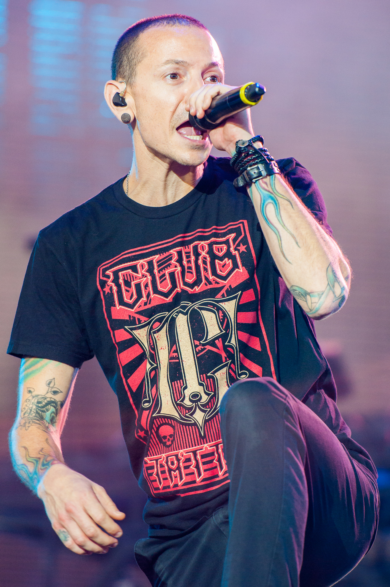 ARGO-Konzerte,Centerstage,Chester Bennington,Konzert,Linkin Park,Livekonzert,Livemusik,Musik,RiP,Rock im Park 2014